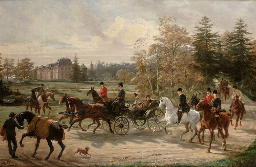 Le départ pour la chasse